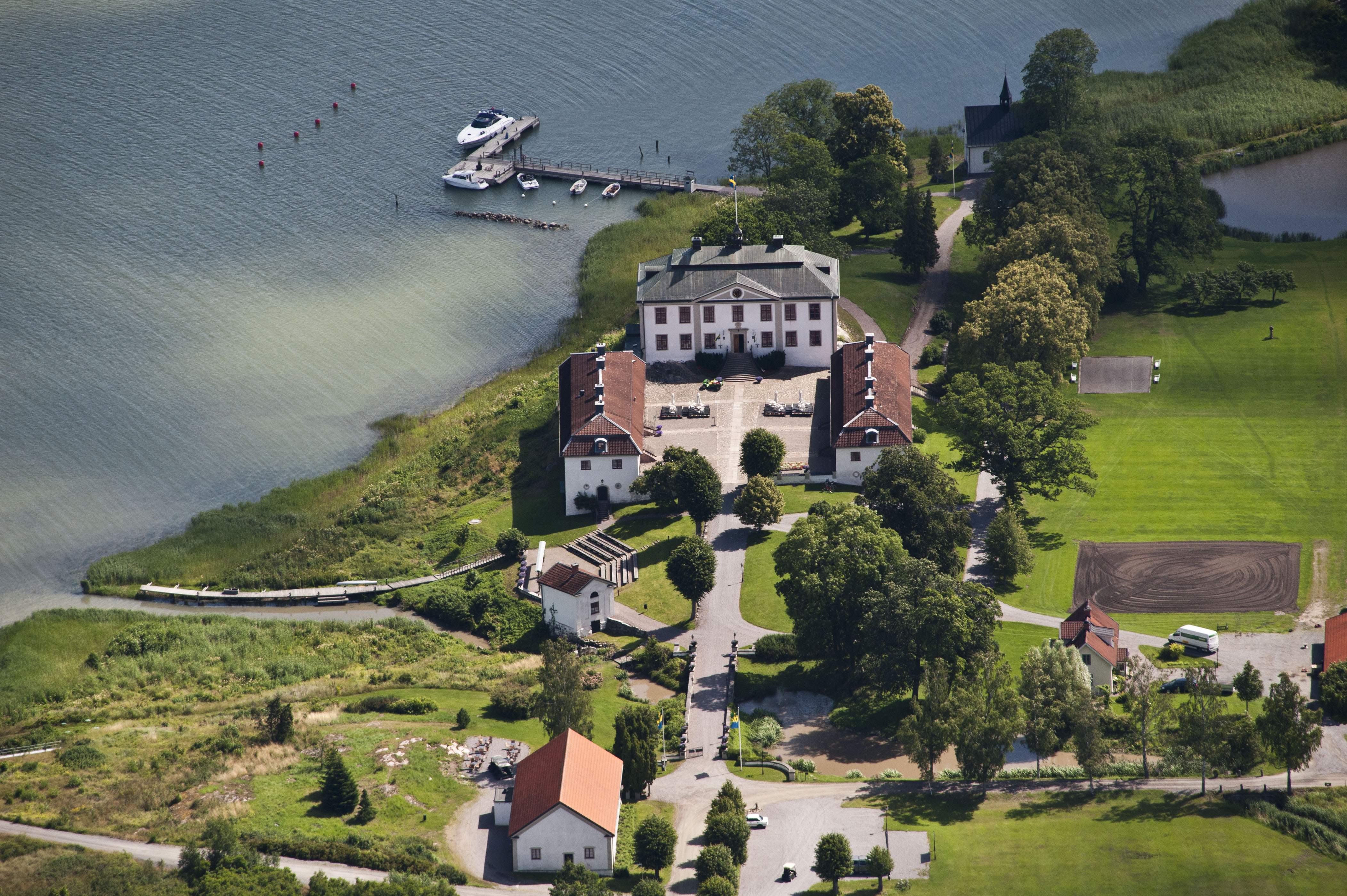 Mauritzbergs herrgård